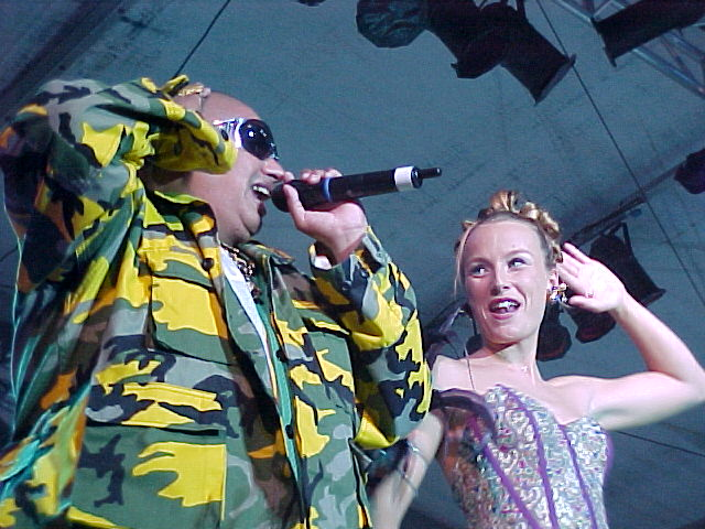 King Africa en Puerto del Rosario